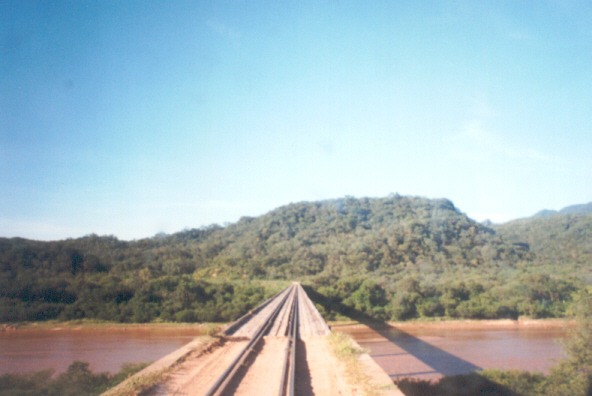 Puente ferroviario sobre el río Parapetí, en San Antonio, Santa Cruz, Bolivia.